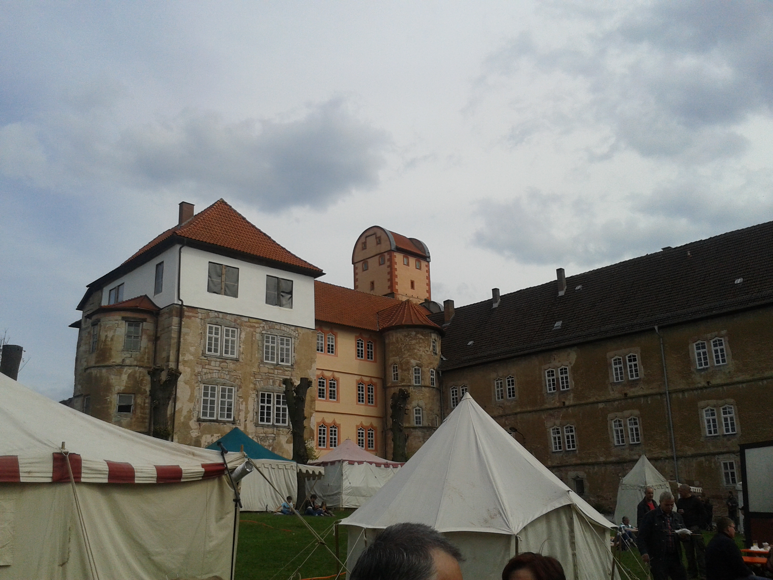 Schloss und Schlosskirche in (Herren-)Breitungen, Kreis Schmalkalden-Meiningen